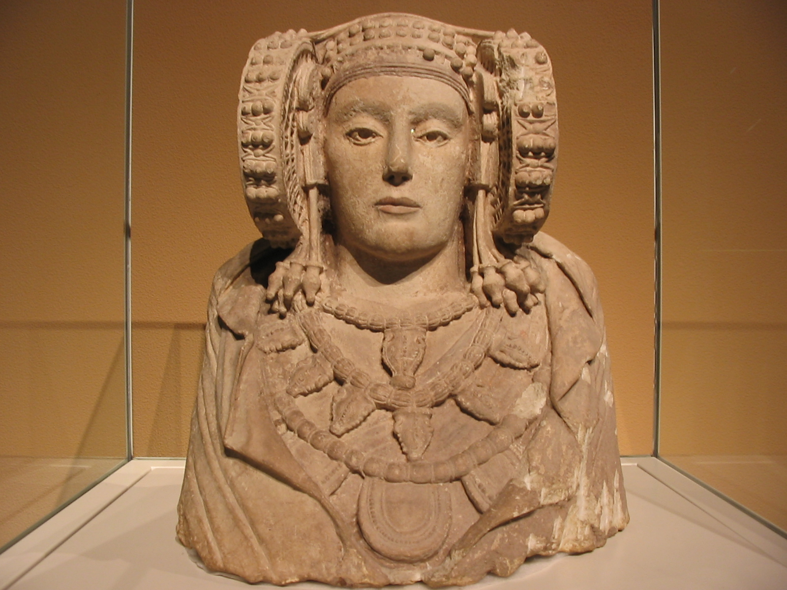 Fotografía de Pablo Alberto Salguero Dama de Elche. Museo arqueológico Nacional. Madrid. España